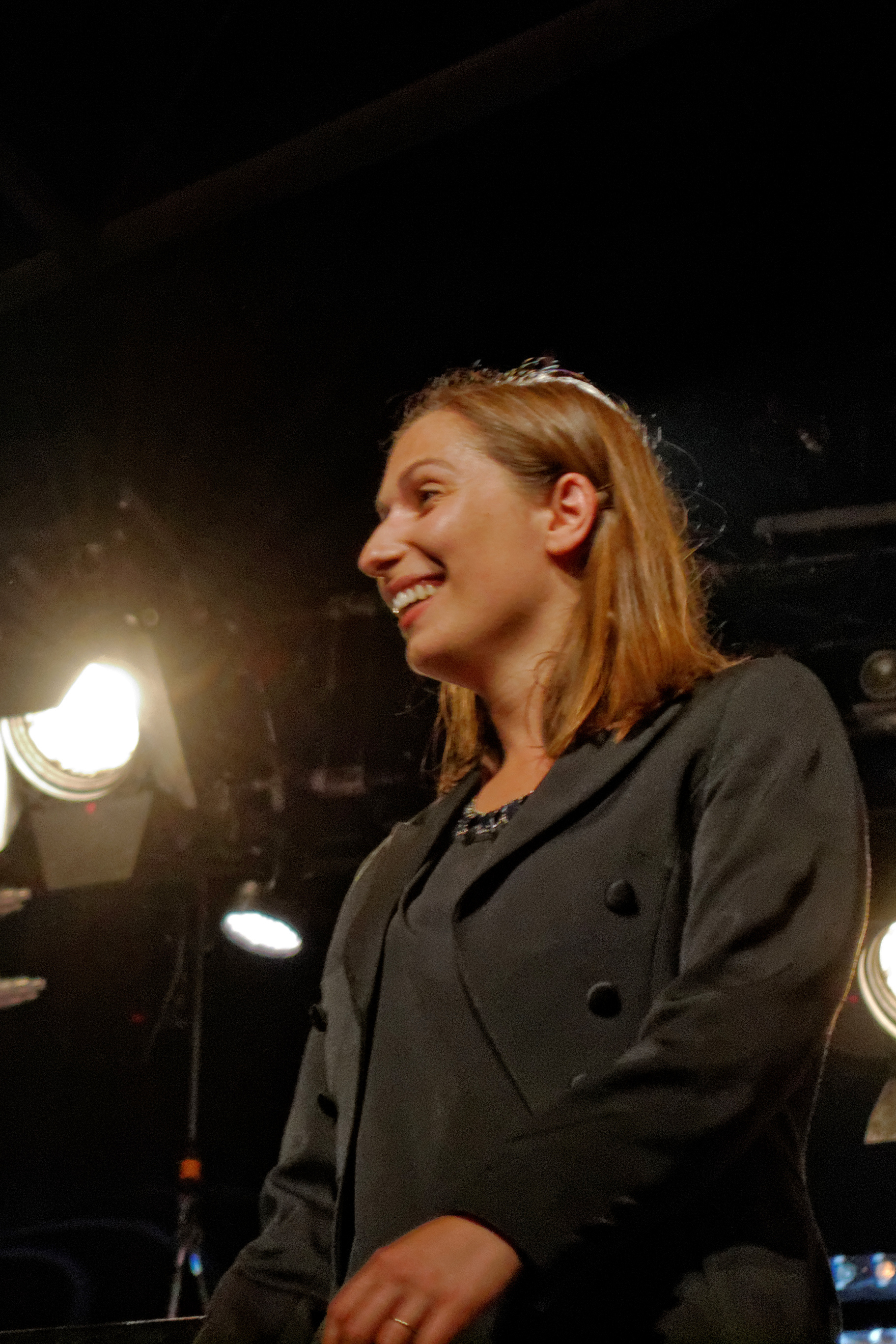 Ariane Matiakh dirige l'Orchestre symphonique de Bretagne pour la Symphonie N°3 "Le Ponant" de Didier Squiban lors du festival de Cornouaille à l'espace Gradlon le 25 juillet 2014.